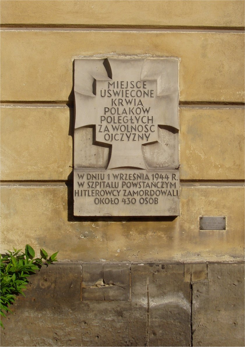 Na ścianie pałacu Raczyńskich. Kalendarium powstania warszawskiego - 1 września